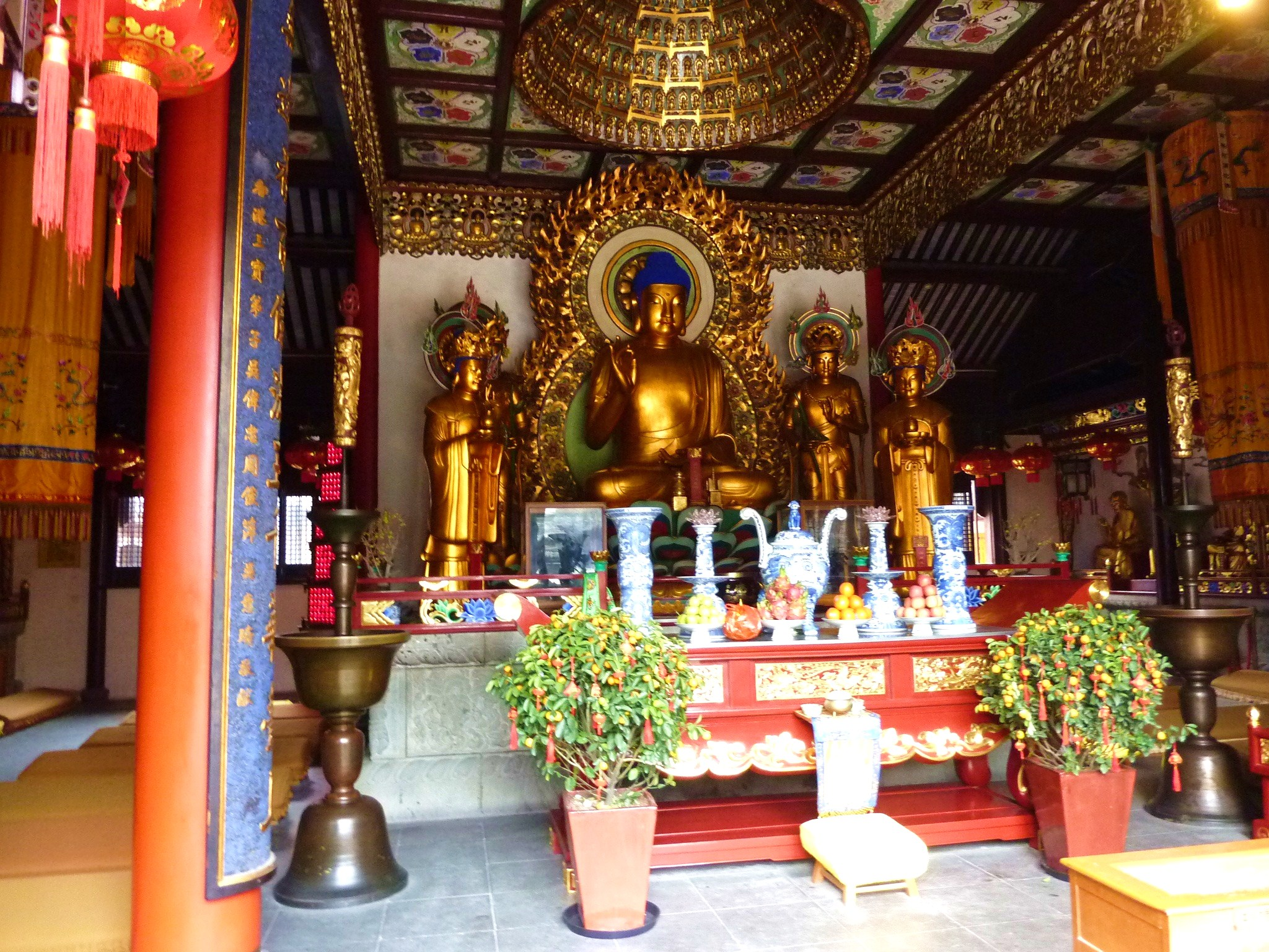 ·˙·ChinaUli2010·.· Shanghai